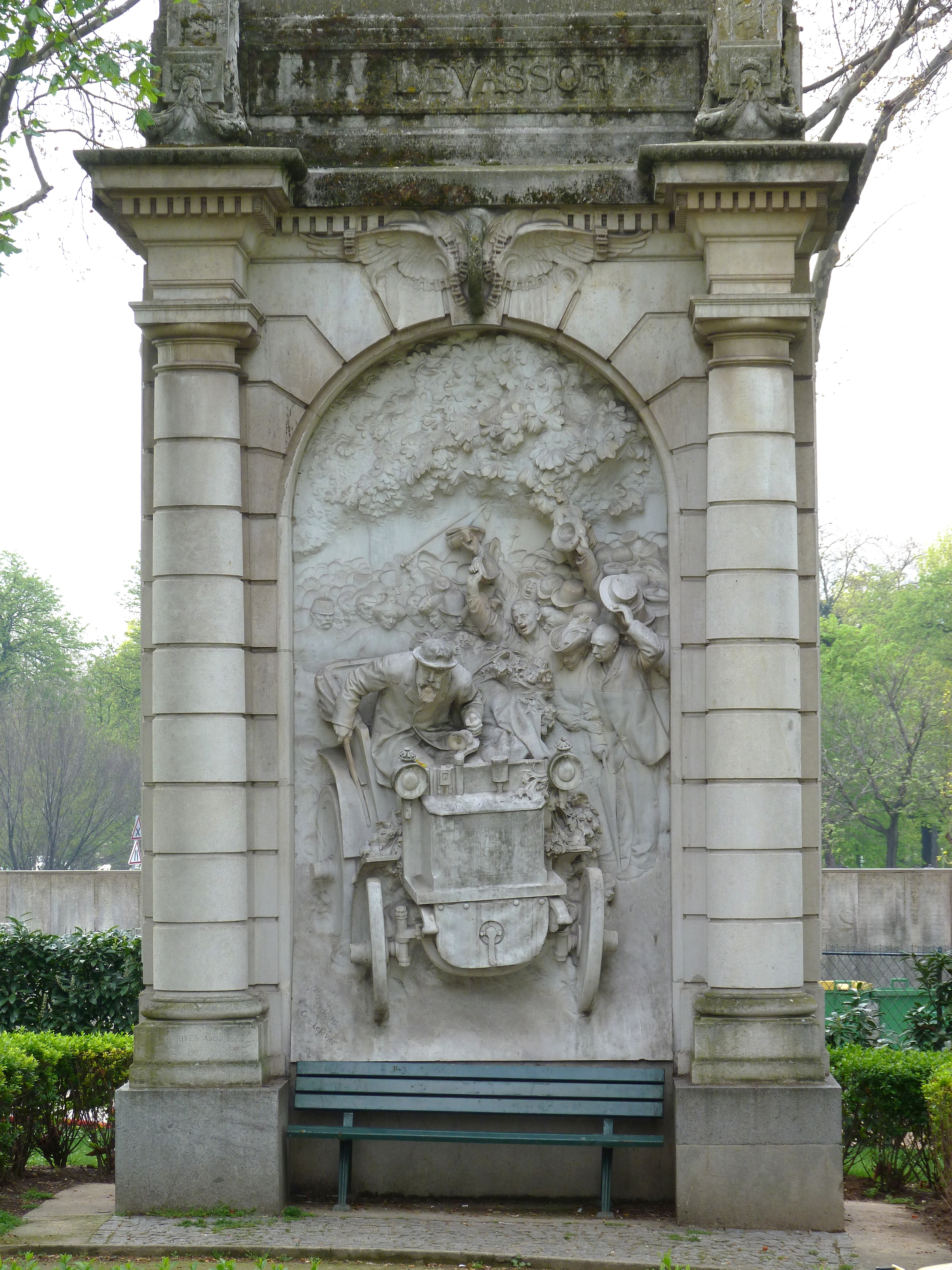 Monument à Émile Levassor, dit aussi Monument à l'Automobiliste, marbre (1907) dans le square Alexandre-et-René-Parodi (Paris 16e arrond), sculpté par Camille Lefèvre d'après l'esquisse de Jules Dalou. Vue frontale.